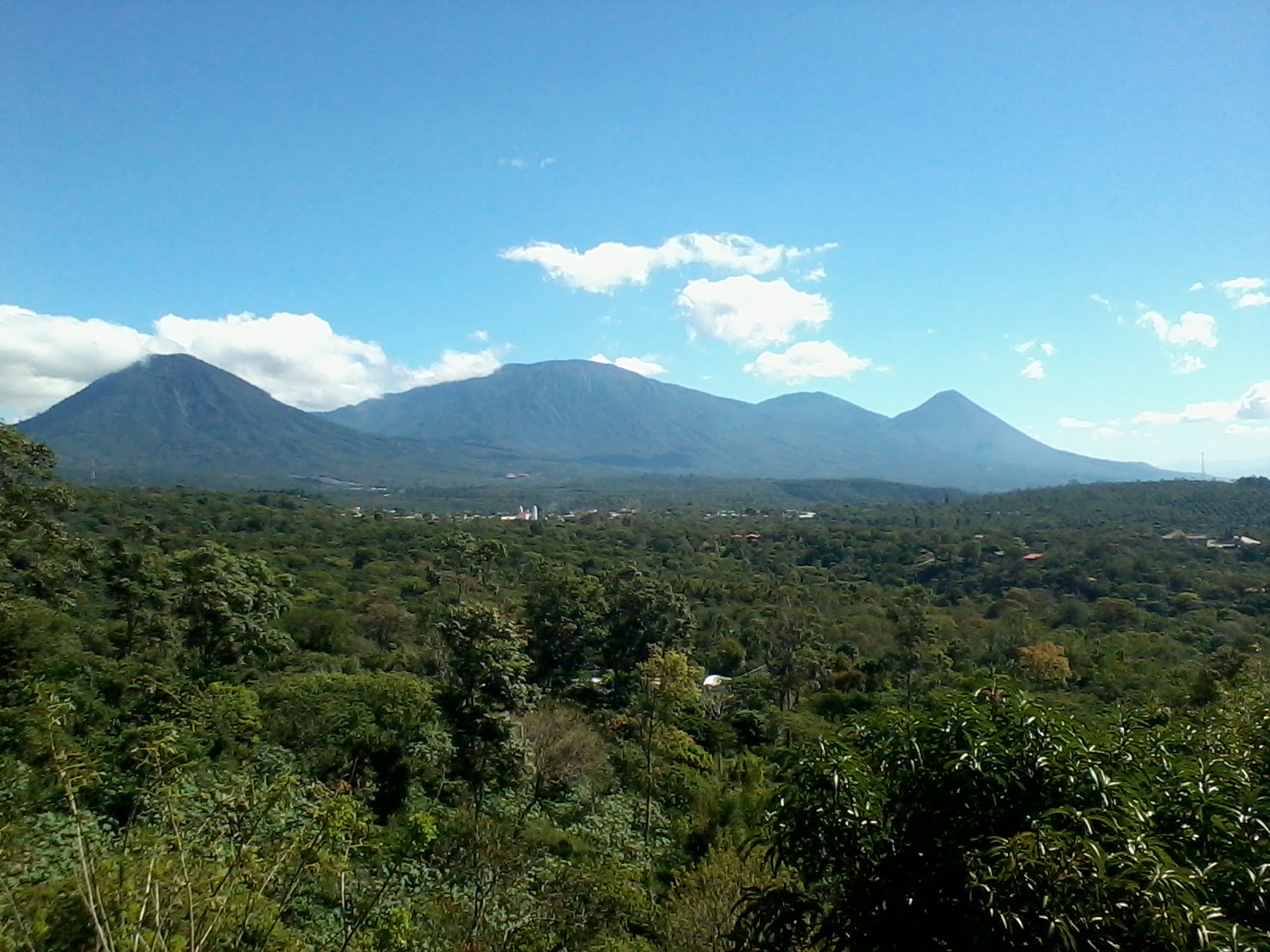 Salcoatitán, El Salvador